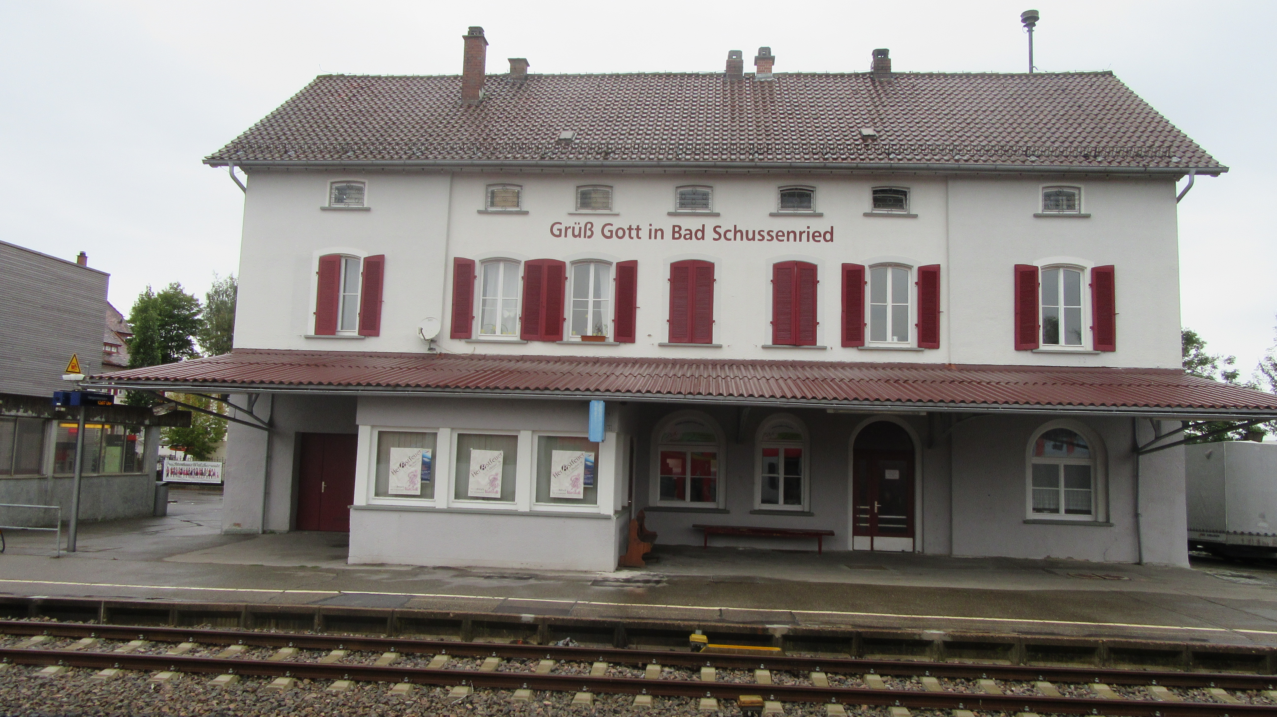 Das Empfangsgebäude des Bahnhofs Bad Schussenried von der Gleisseite.